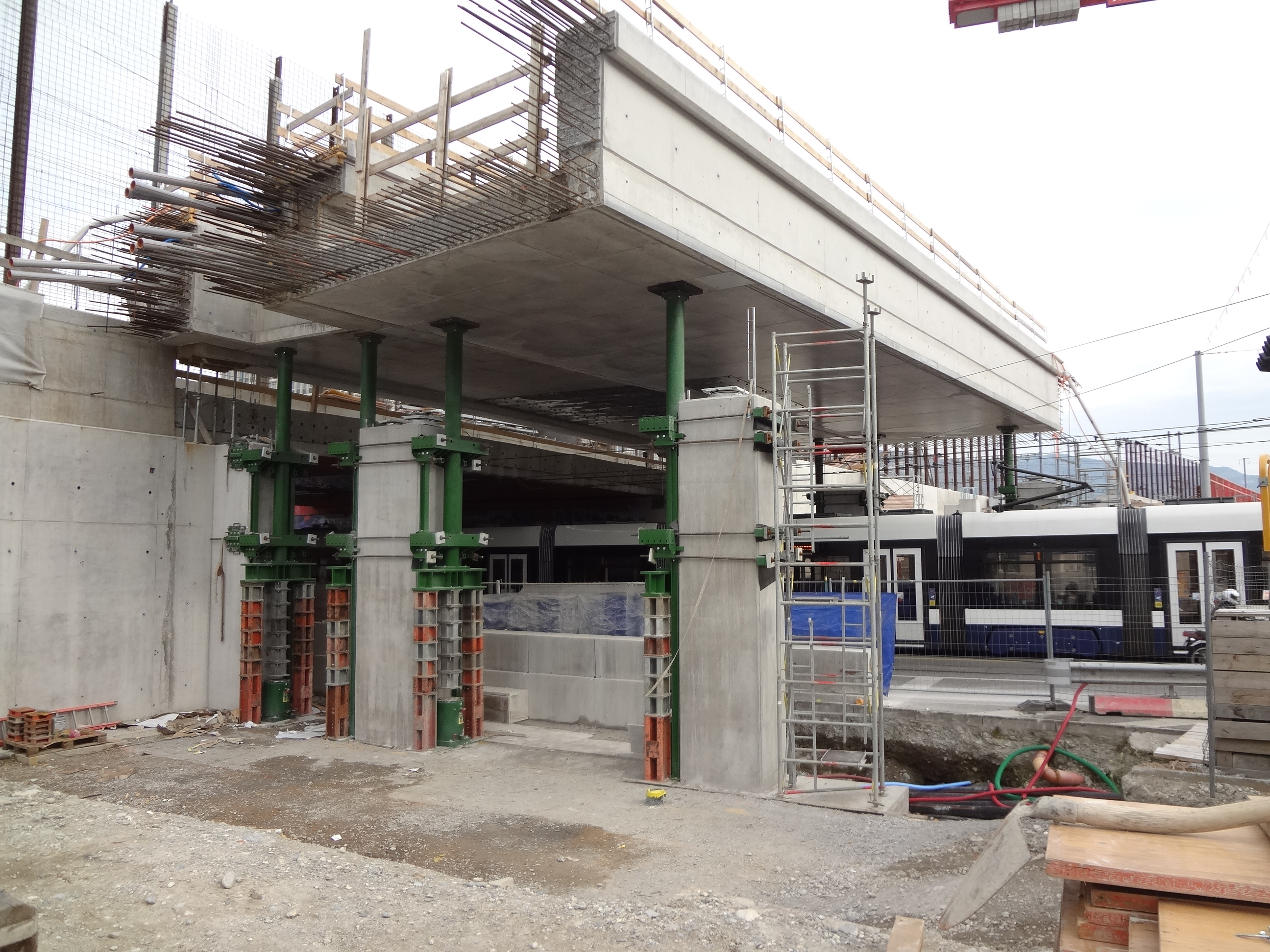 Chantier de la gare de Lancy-Pont-Rouge. Réalisation de deux nouveaux ponts sur la route des Acacias : une voie de train et un quai. Les ponts reposent sur des vérins. On peut voir que les nouveaux ponts sont plus hauts que l'ancien pont. Passage d'un tramway de la ligne 15. Mai 2016.